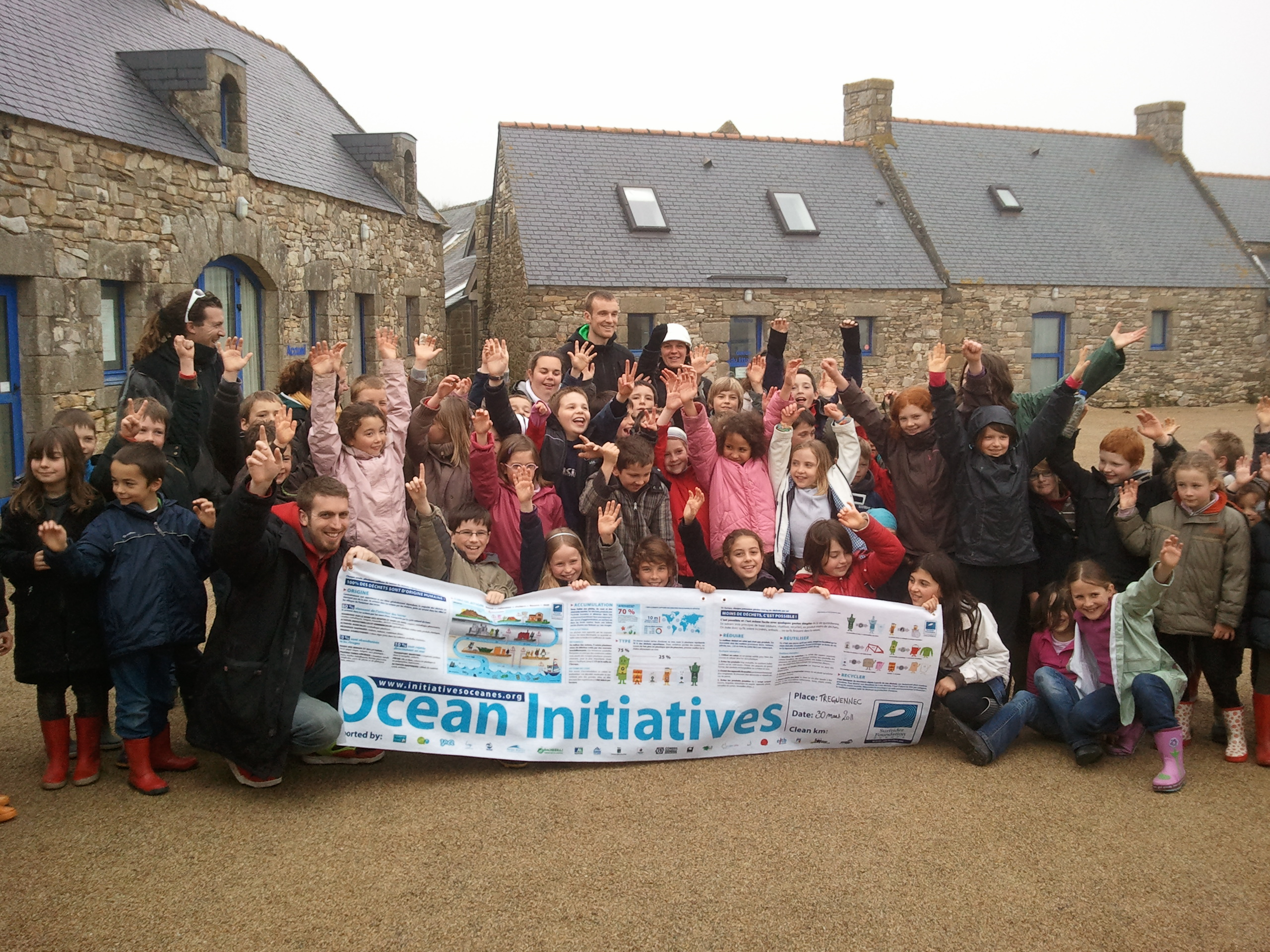 Participation d'une école à l'opération "Océan Initiative" de Surfrider Fondation, nettoyage de la plage de Tregennec, le 30 mars 2011